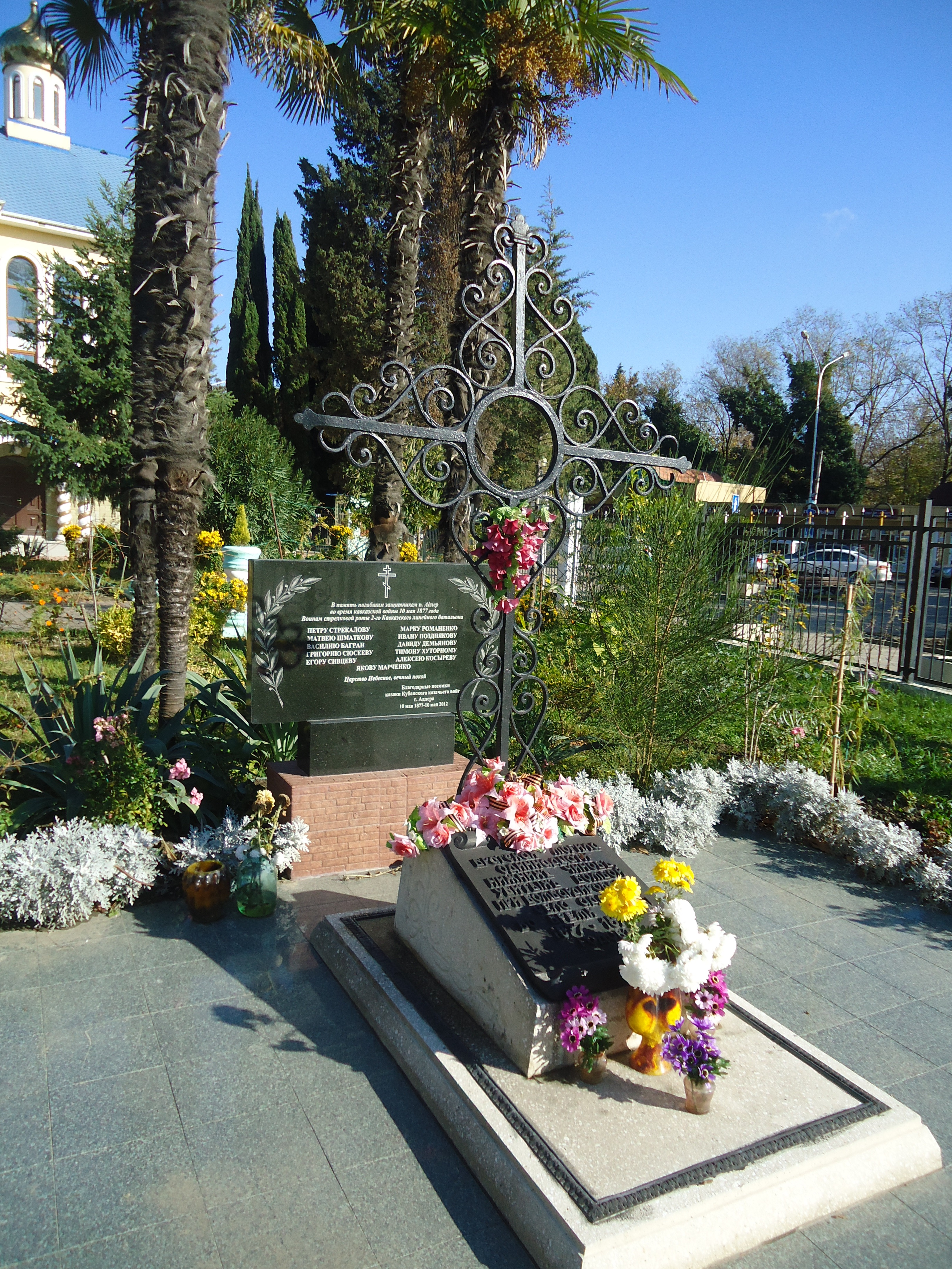 Памятник погибшим в годы Кавказской войны на территории церкви Святого Духа в Адлере